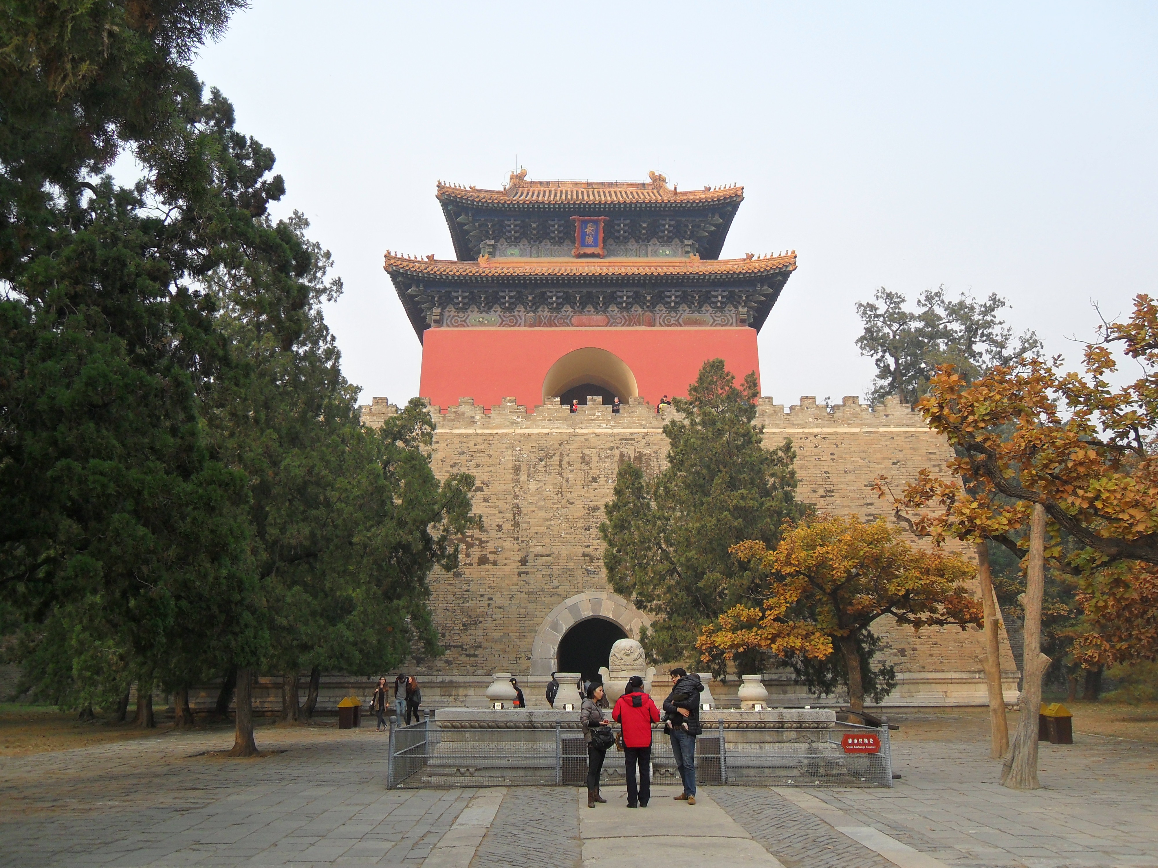 Ming-Gräber